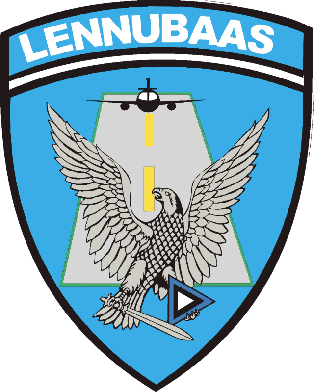 Ämari Lennubaasi embleem